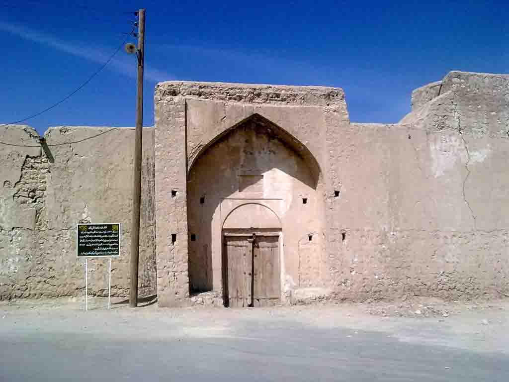 کاروانسراي رضا قلي خان جويمی